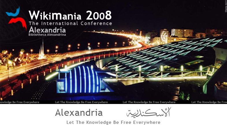 Banner for Alexandria Wikimania bid